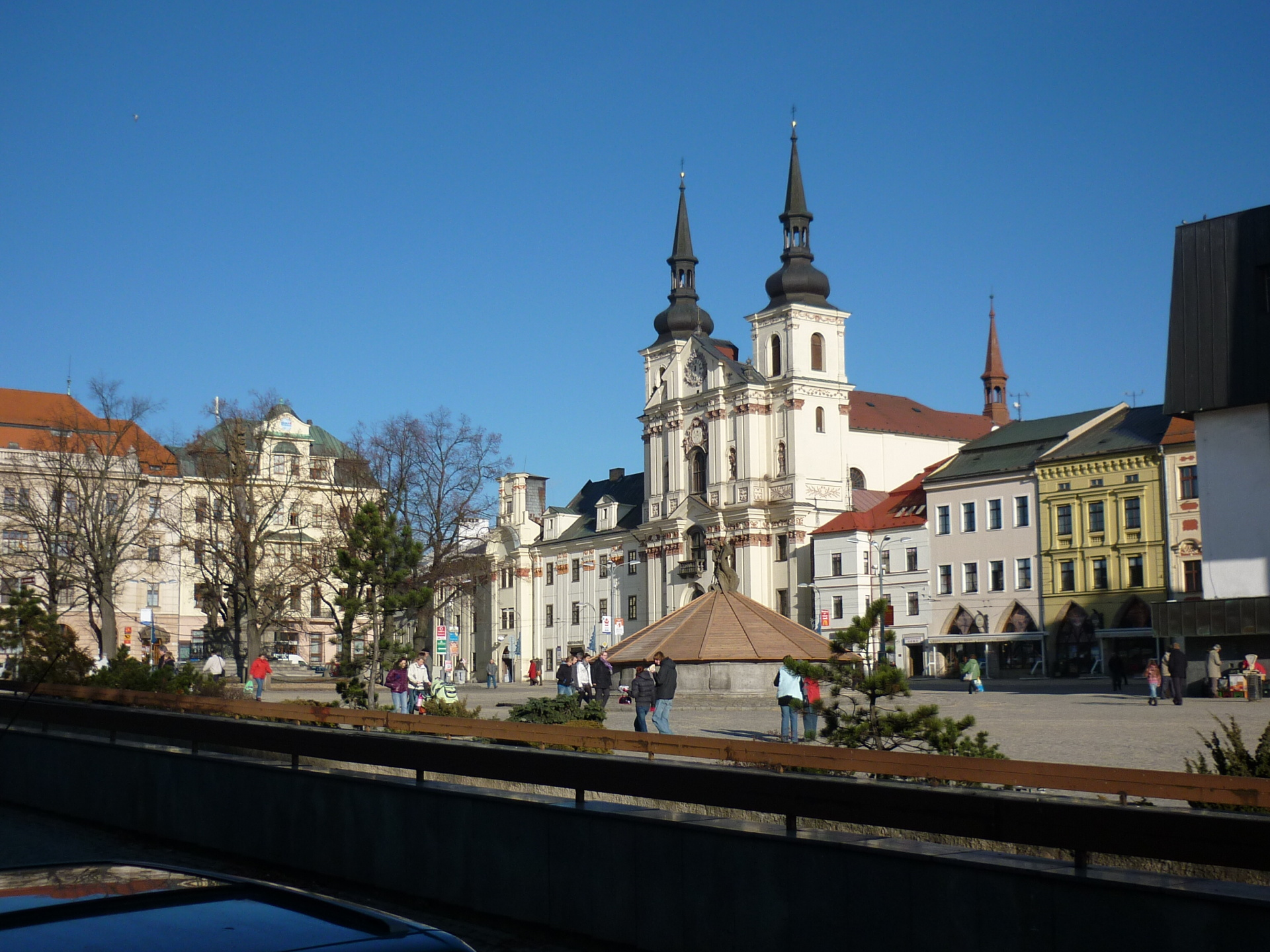 Náměstí v Jihlavě